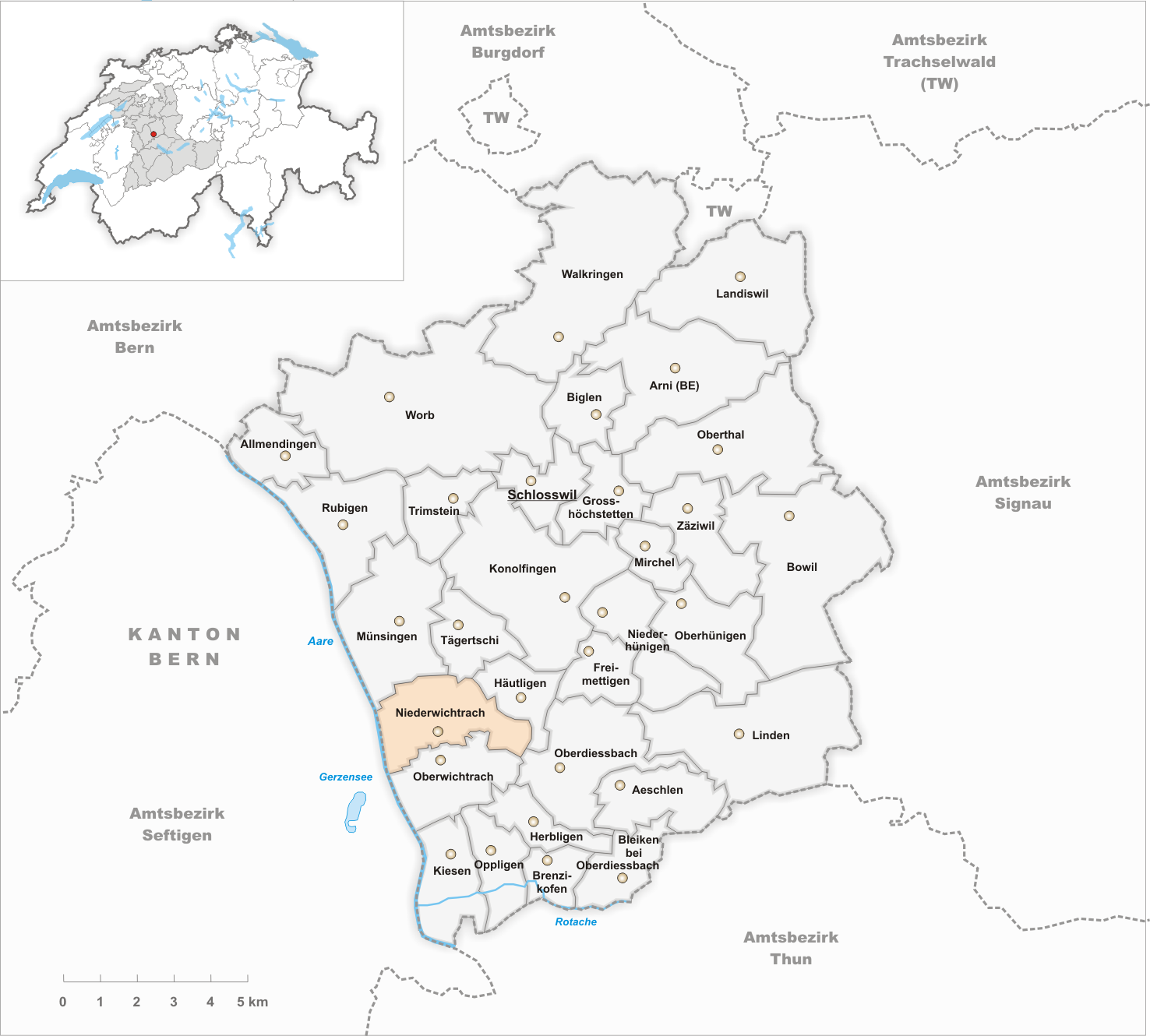 Municipality Niederwichtrach